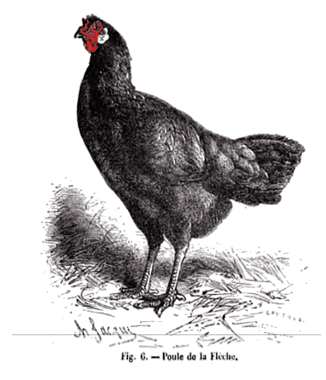 Poule de la Fleche dans Merveilles de la nature: l'homme et les animaux (vol 4) d'Alfred Edmund Brehm 1878